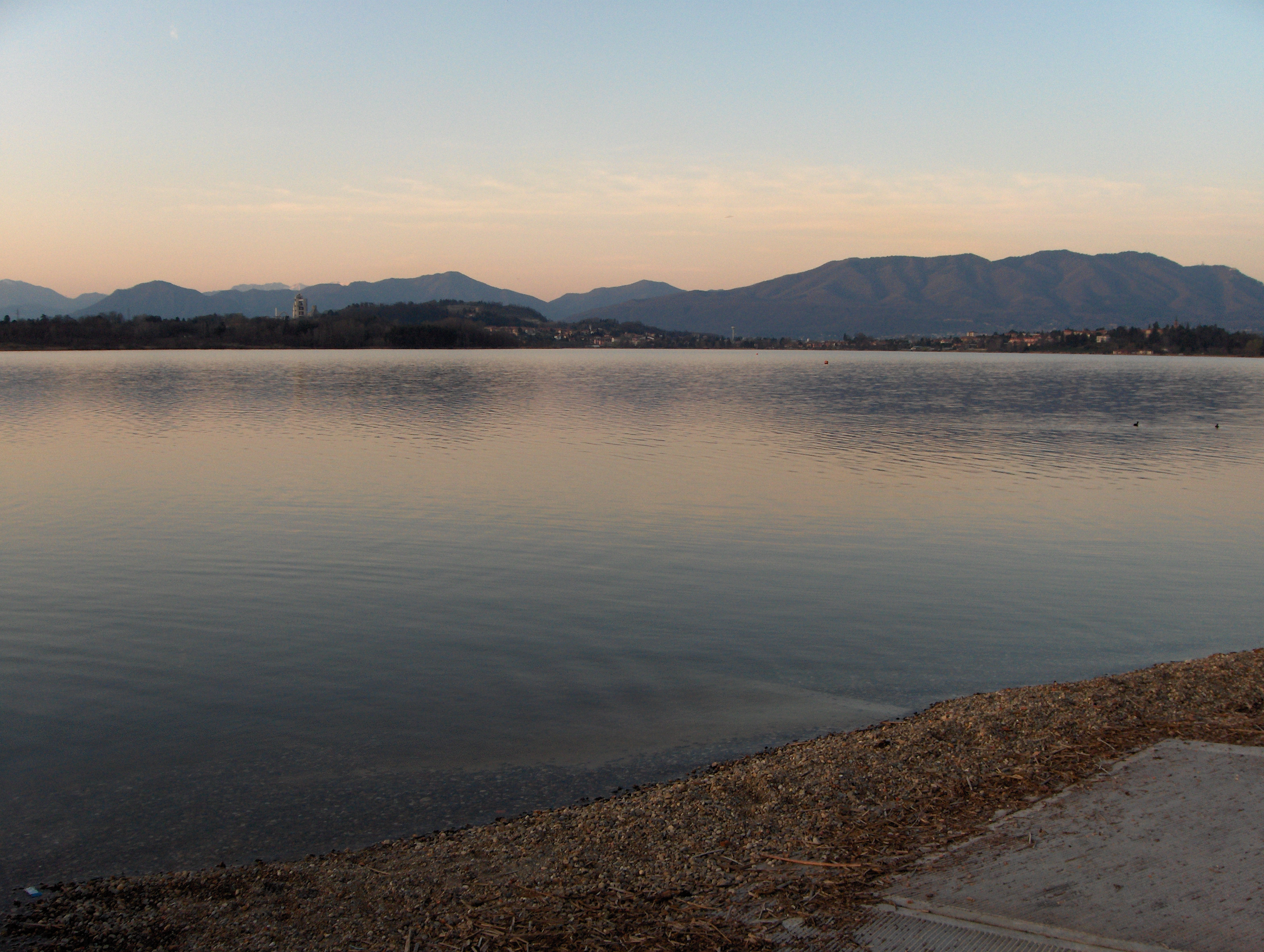 Veduta del lago di Comabbio dalla riva di Corgeno (Varese, Italy)